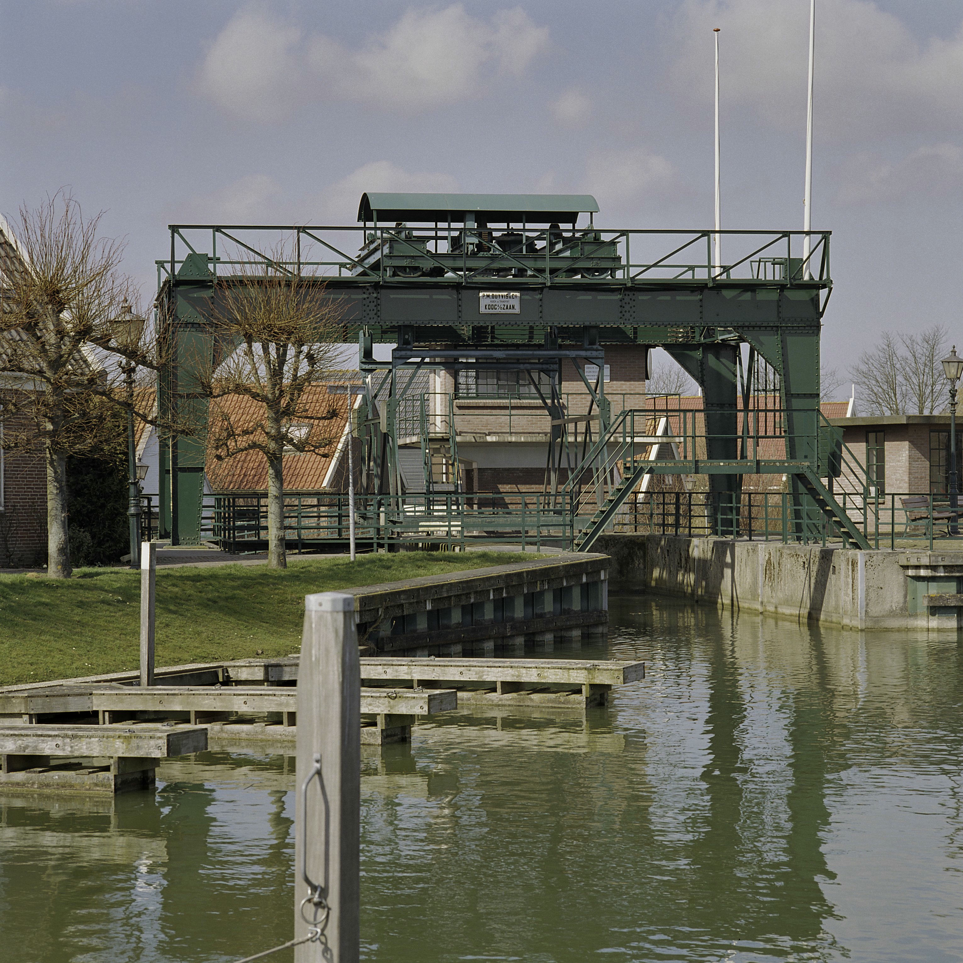 Scheepslift: Overzicht scheepslift (opmerking: Gefotografeerd voor Monumenten In Nederland Noord-Holland)